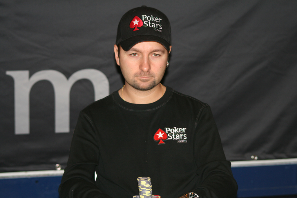 Daniel Negreanu at EPT Montecarlo in 2008